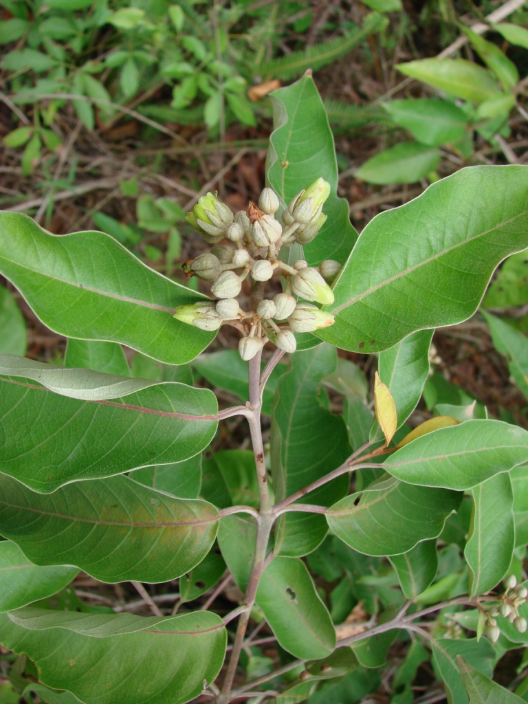 Vismia guianensis (Aubl.) Choisy (Sin. het. Vismia acuminata) - HYPERICACEAE - ARIE da Granja do Ipê - Brasília - Distrito Federal - Brasil.